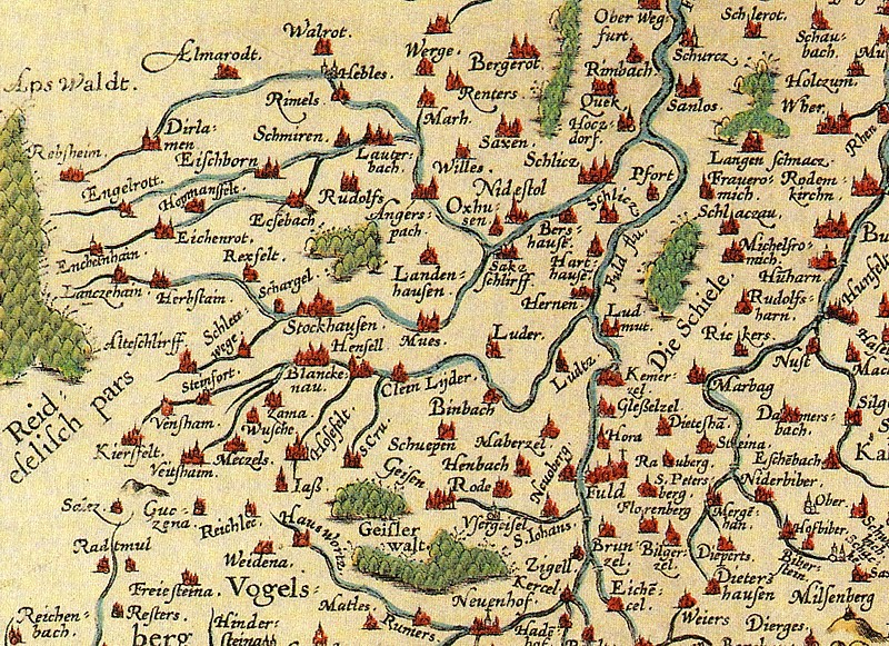 Ausschnitt aus der Landkarte "der Buchavia oder des Hochstifts Fulda" von dem Fuldischen Kleriker Wolfgang Regerwill aus dem Jahre 1574.